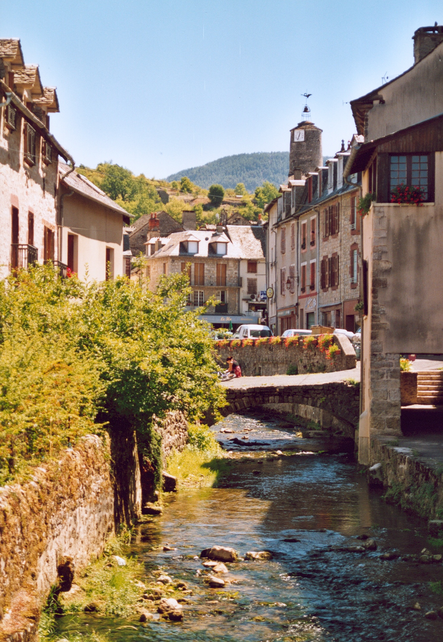 France Lozère La Canourgue Photographie prise par GIRAUD Patrick Août 2005